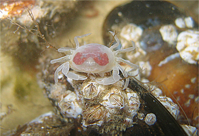 Crabe petit pois (Pinnotheres pisum) dans les aquariums de mareis